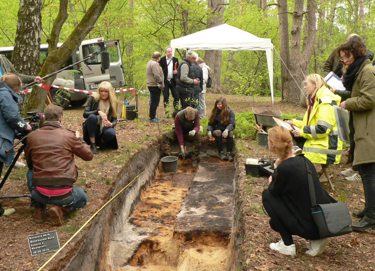 Ausgrabung im früheren Lagerareal des Römerlagers Bielefeld mit Presse